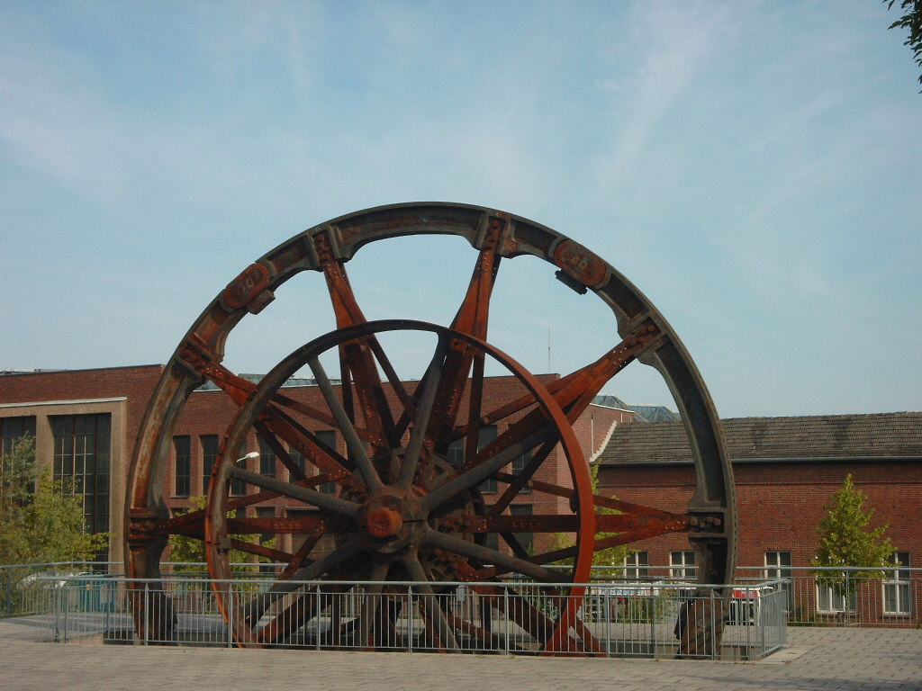 Stolberg, Zinkhütter Hof, Exponat im Freigelände